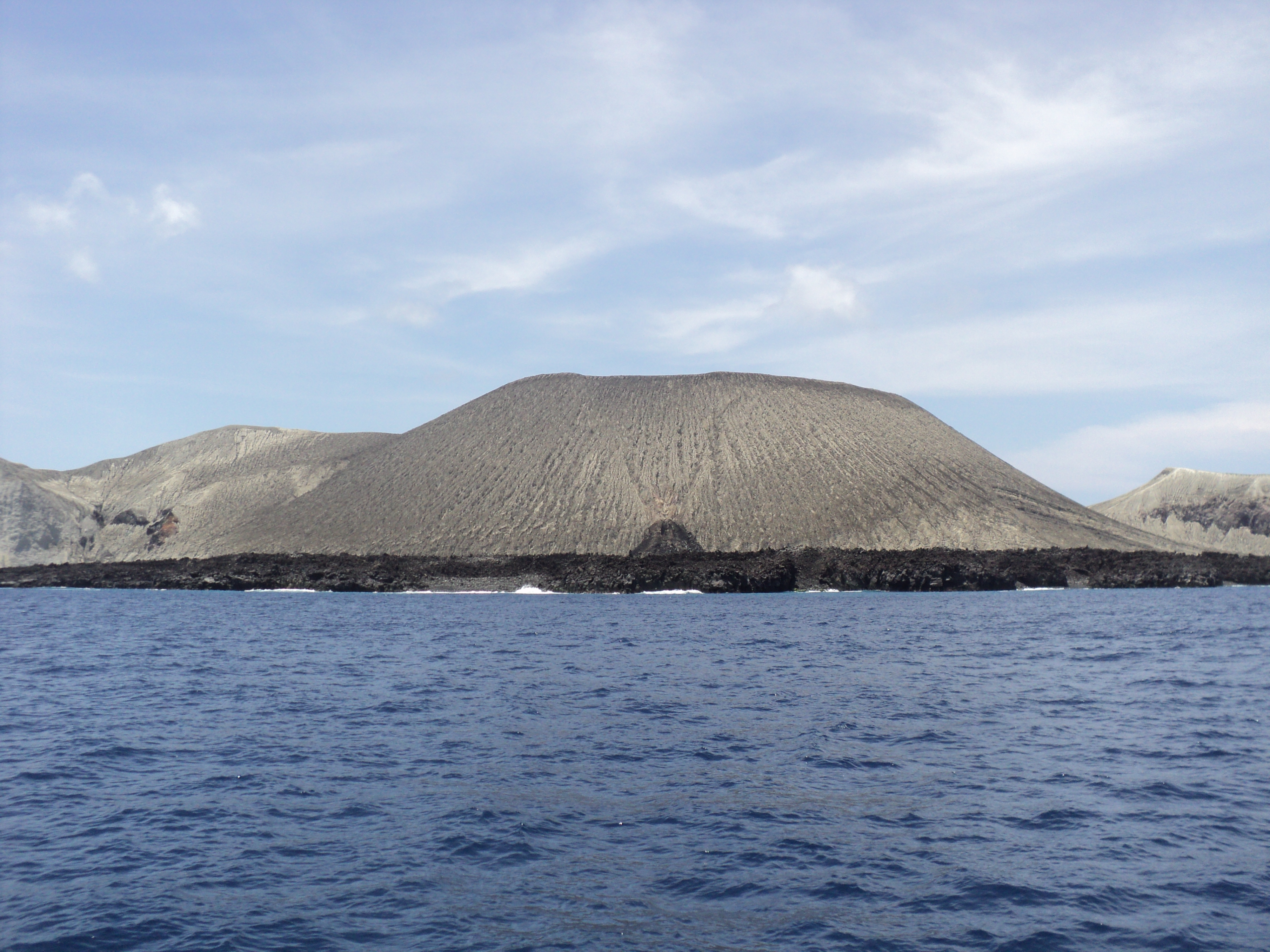 VOLCAN SAN BENEDICTO